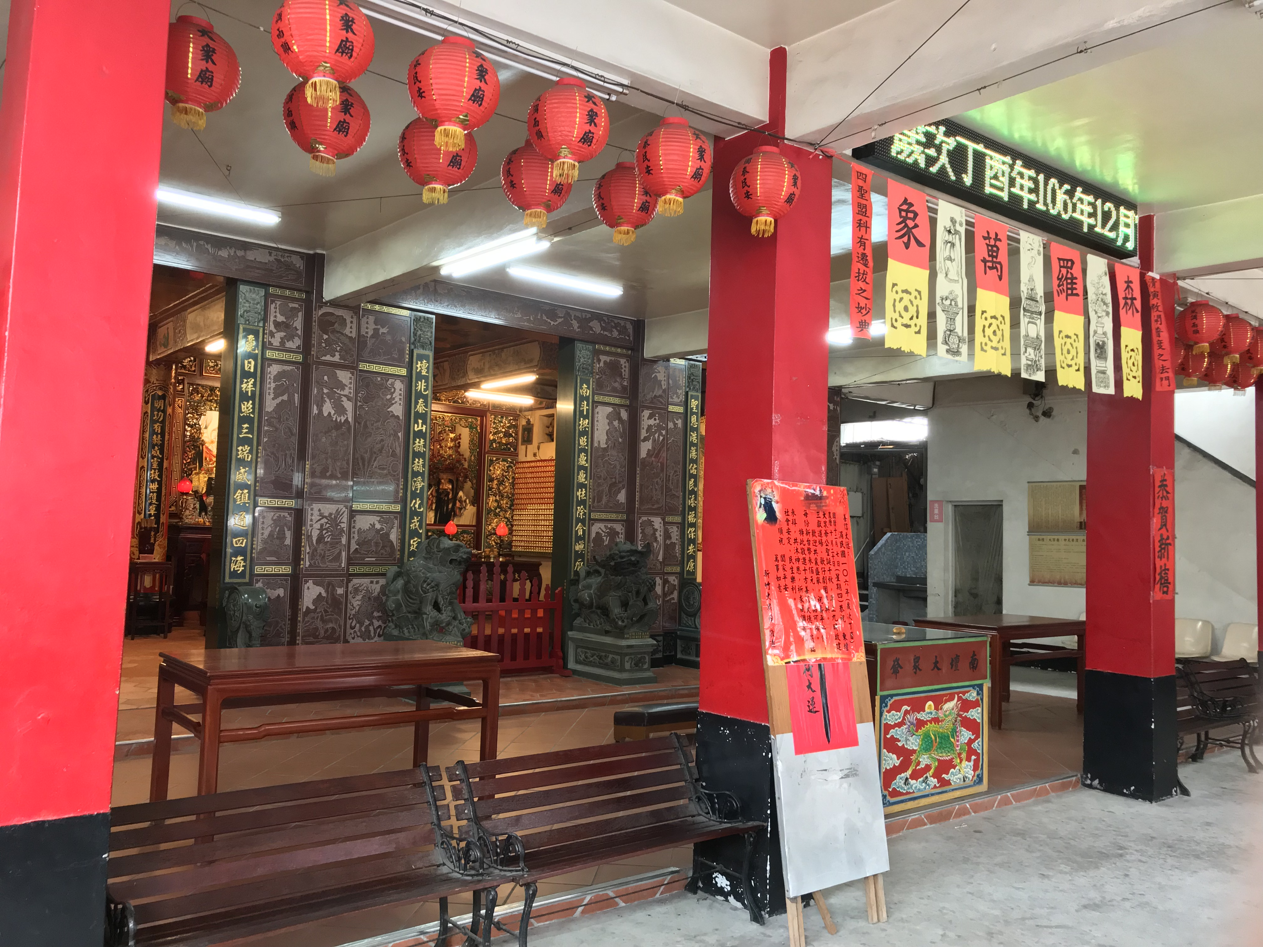 南壇大眾廟一樓